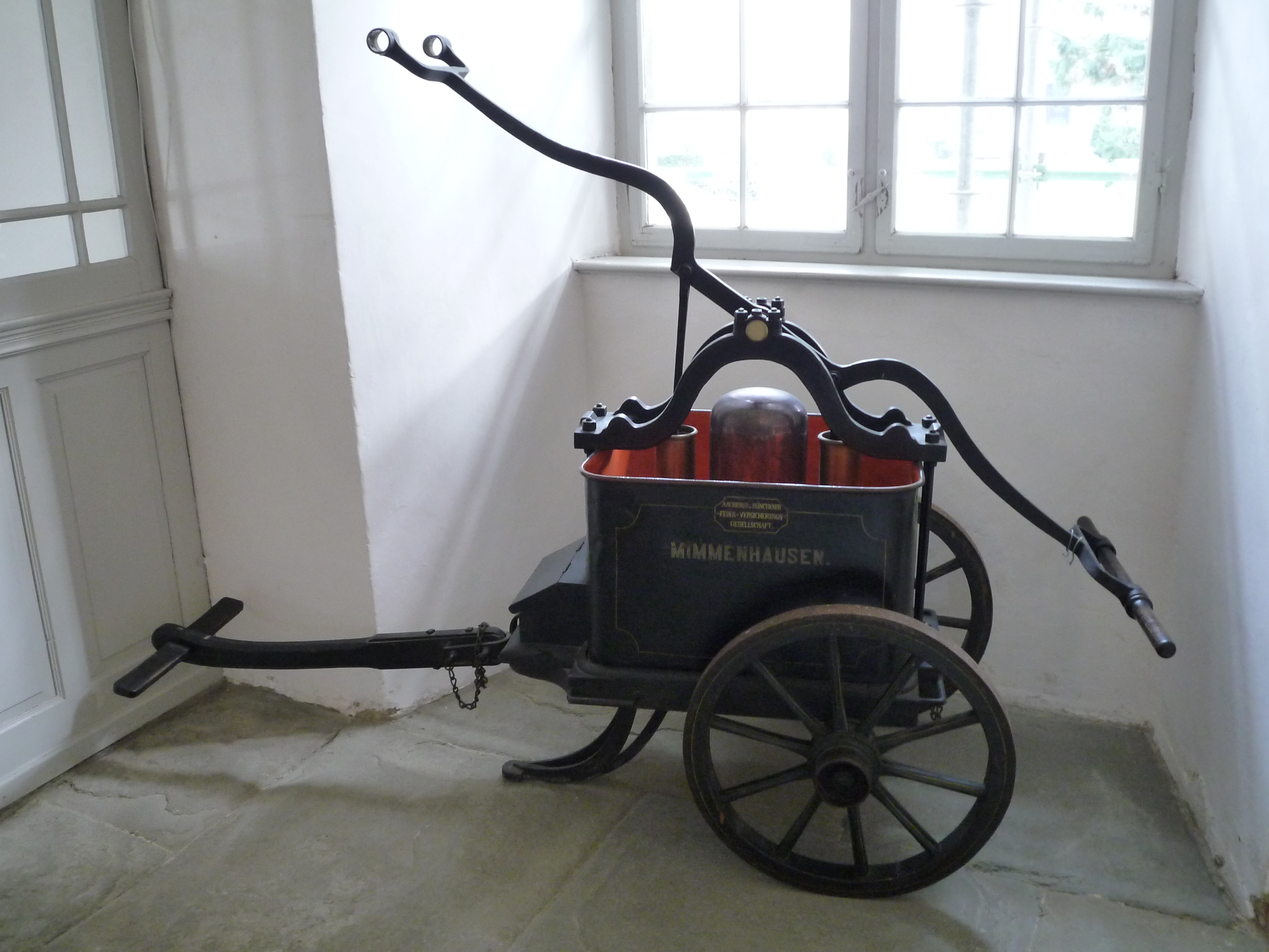 Feuerwehrspritze der Feuerwehr Mimmenhausen, die dieser vermutlich von der Aachen Münchener geschenkt wurde